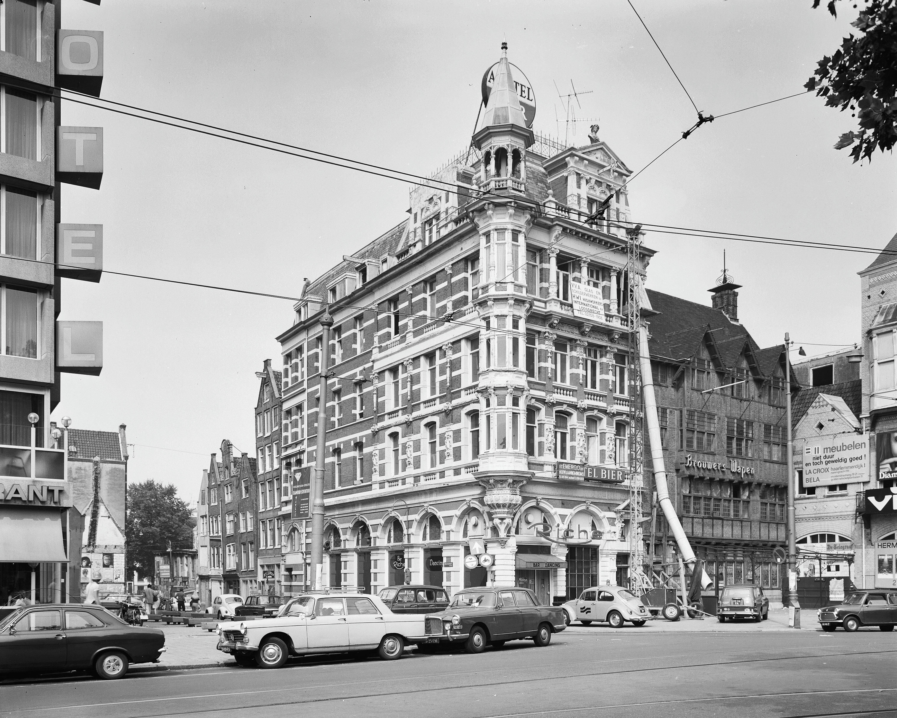 Rembrandtsplein hoek Bakkerstraat